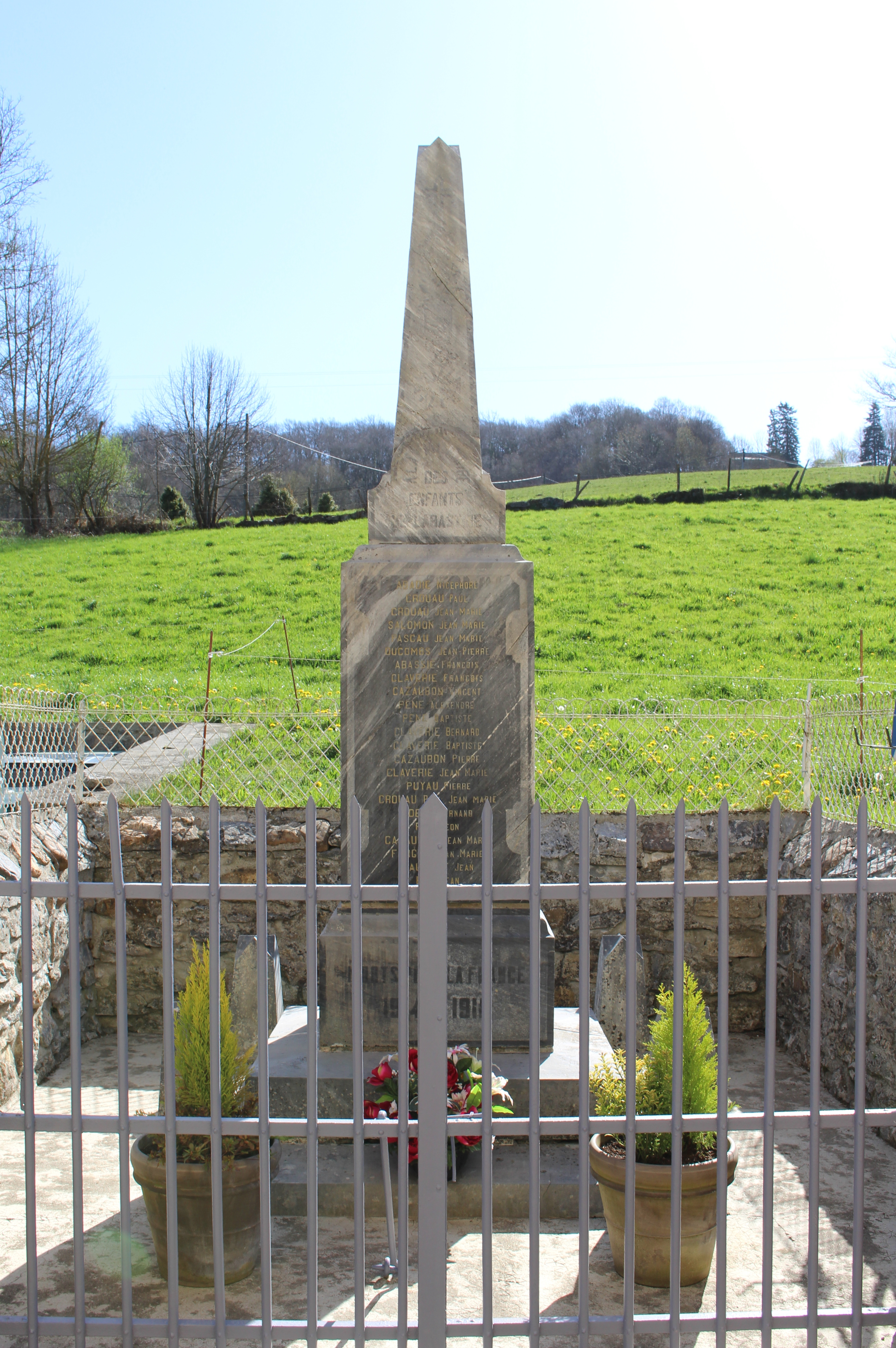 Monument aux morts de Labastide (Hautes-Pyrénées)